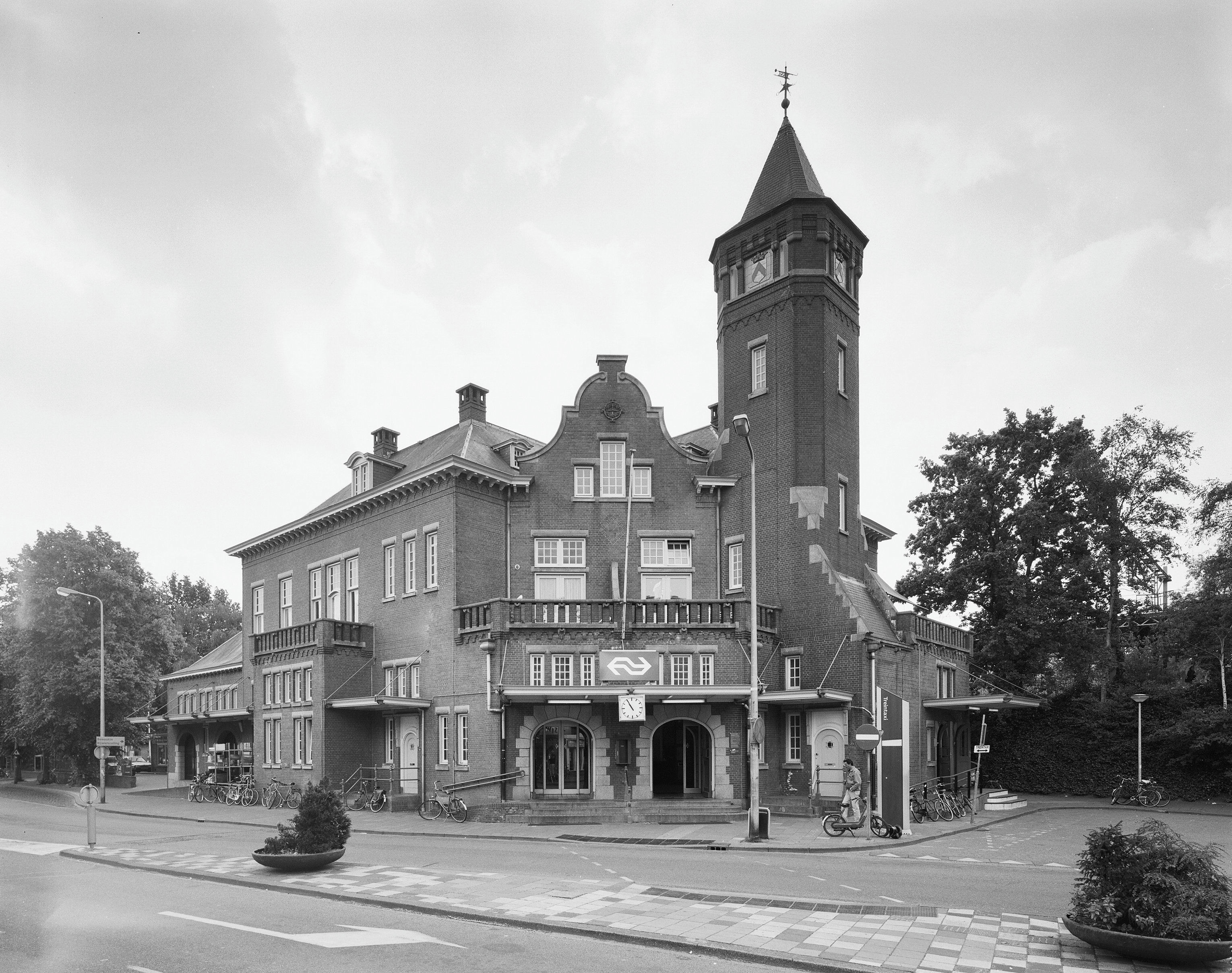 Station Weert: Overzicht voorgevel met toren (opmerking: Gefotografeerd voor Monumenten In Nederland Limburg)